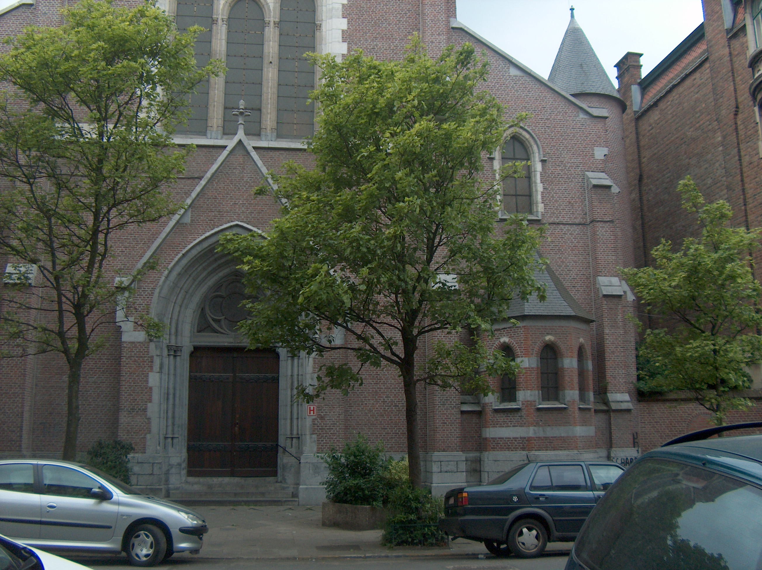 Eglise Sainte-Elisabeth rue Portaels à Schaerbeek, Bruxelles, Belgique.